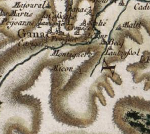 Ganac, carte XVIII°s (Cassini)